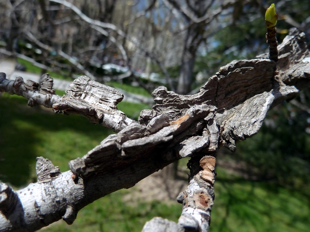 Liquidambar styraciflua (Liquidámbar): Excrecencias patentes discontinuas de corteza en las ramas menores - Paseo del Prado, frente al Museo del Prado, Madrid (España).